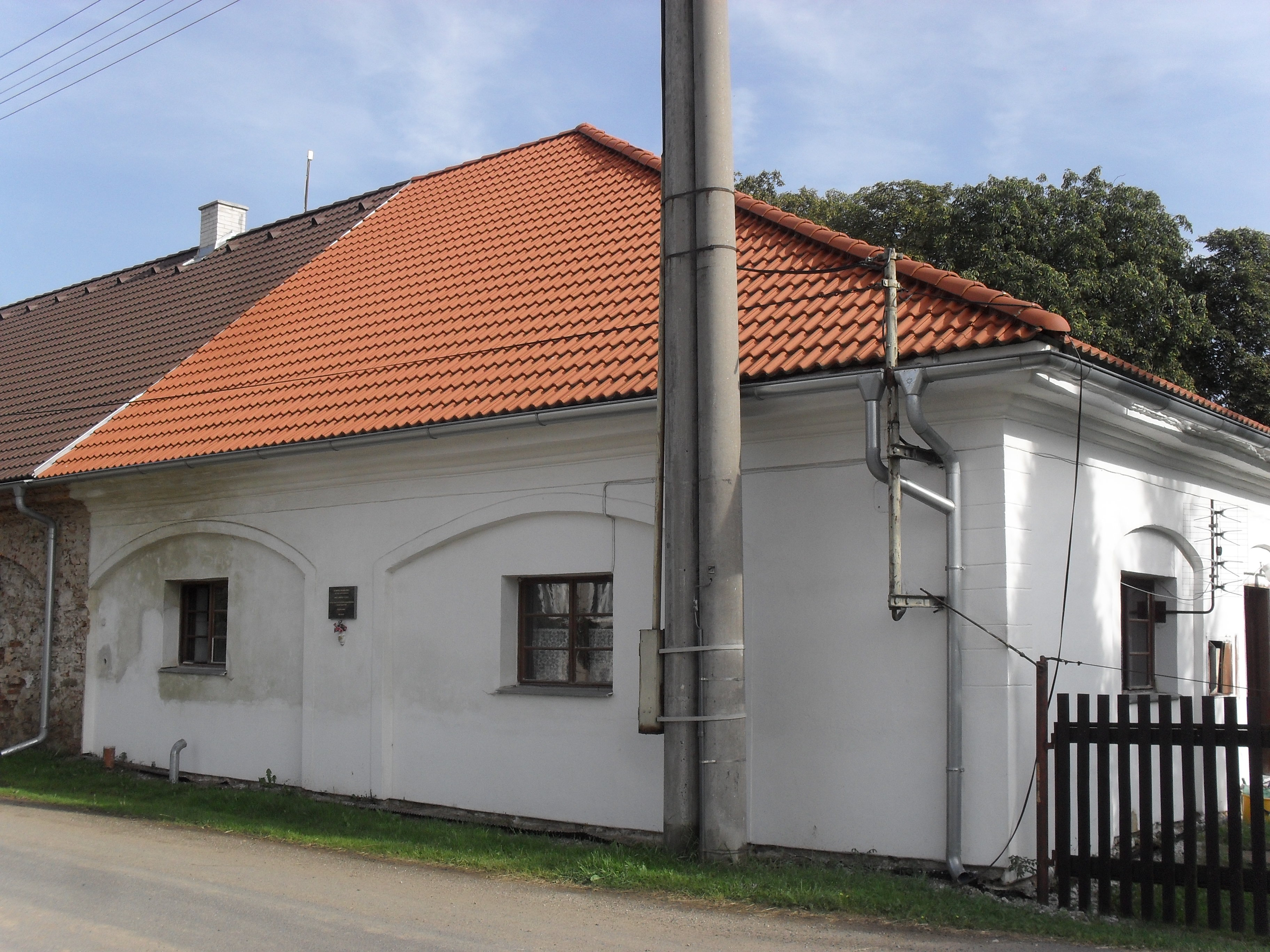 Fotografie pořízena v obci Oselce